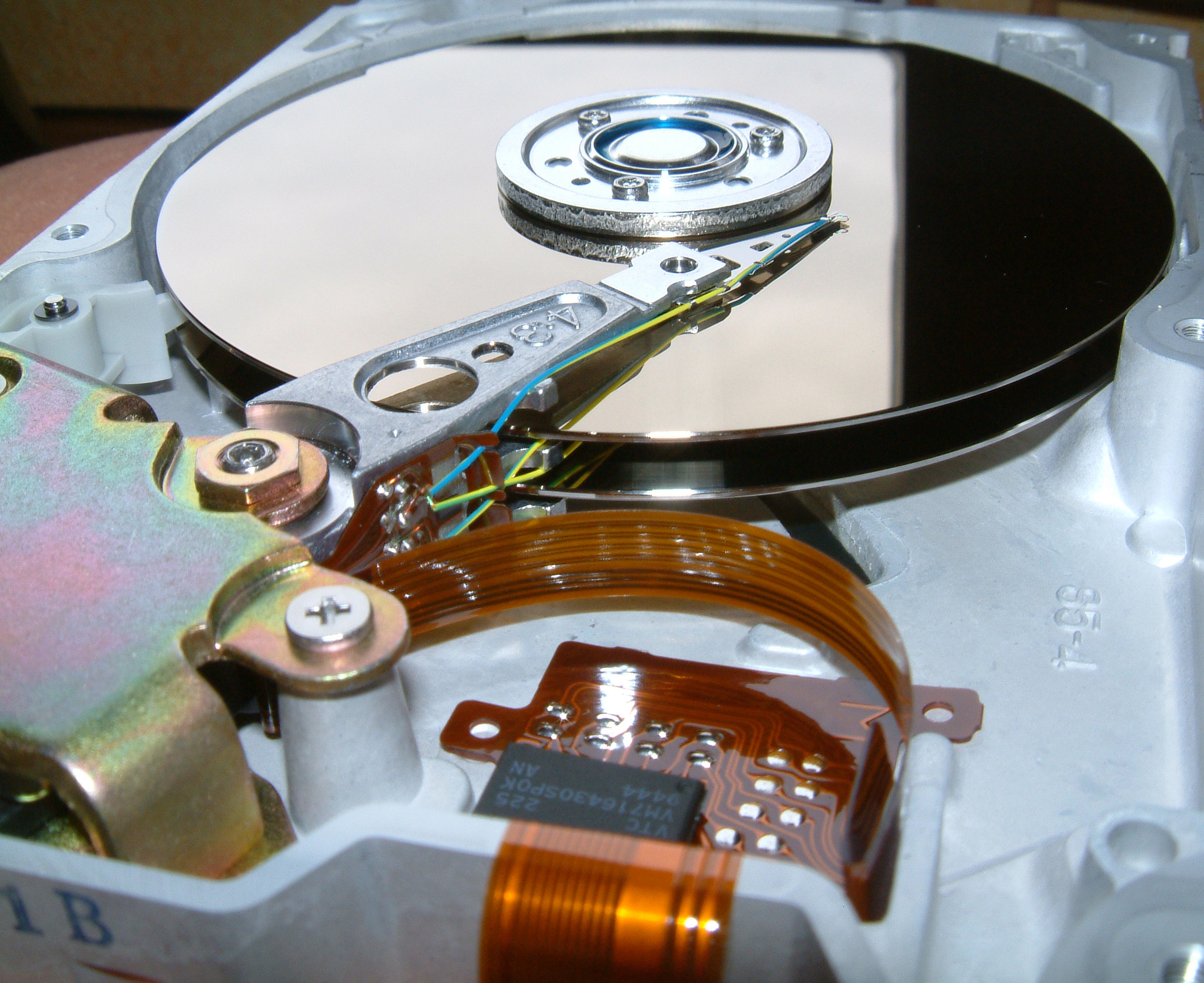 Innenansicht einer Festplatte. Hier mit 512 MB, was aber für den Grundaufbau nicht so relevant sein dürfte.